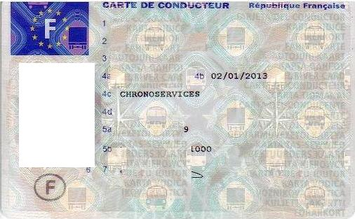 Carte numérique de conducteur routier, face, France.